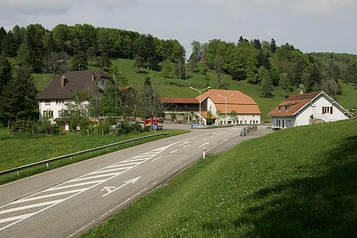 Les Rangiers: Passhöhe mit Restaurant